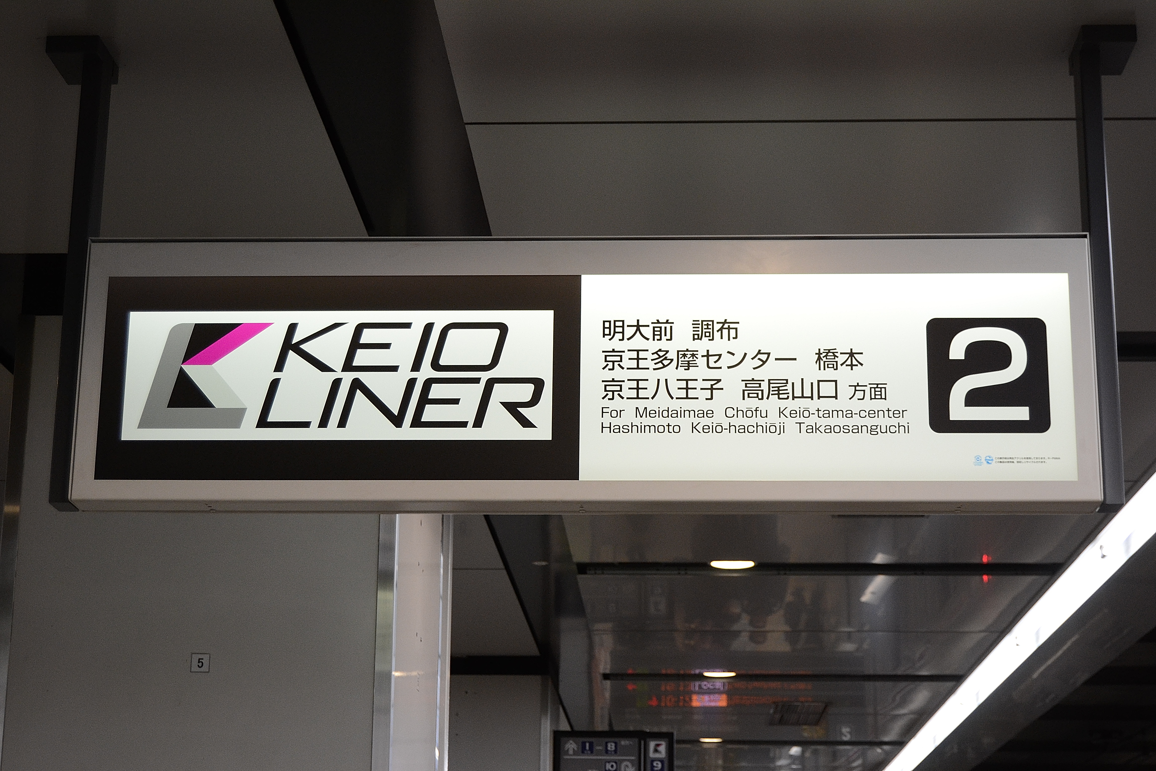 京王電鉄京王線新宿駅の2番線ホームにある京王ライナーの表示と行先表示案内